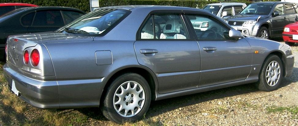 “Nissan_Skyline_R34” Image:Nissan_Skyline_R34_a.jpg Image:Nissan_Skyline_R34_b.jpg Category:Nissan Skyline R34